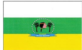 Bandera del Municipio Cacique Manaure del Estado Falcón.